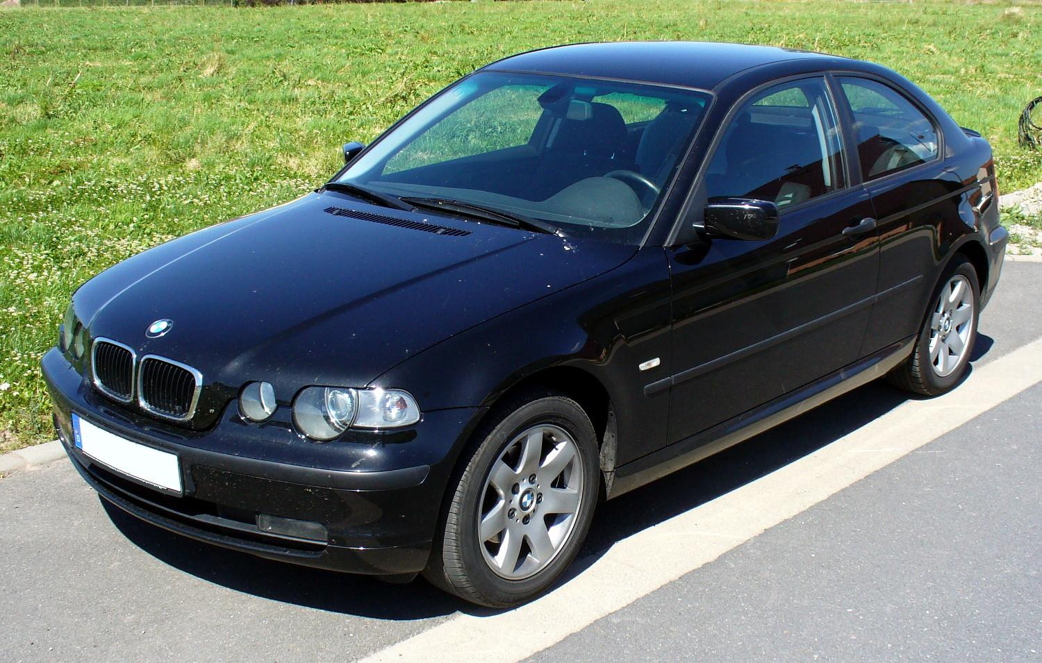 BMW E46 Compact